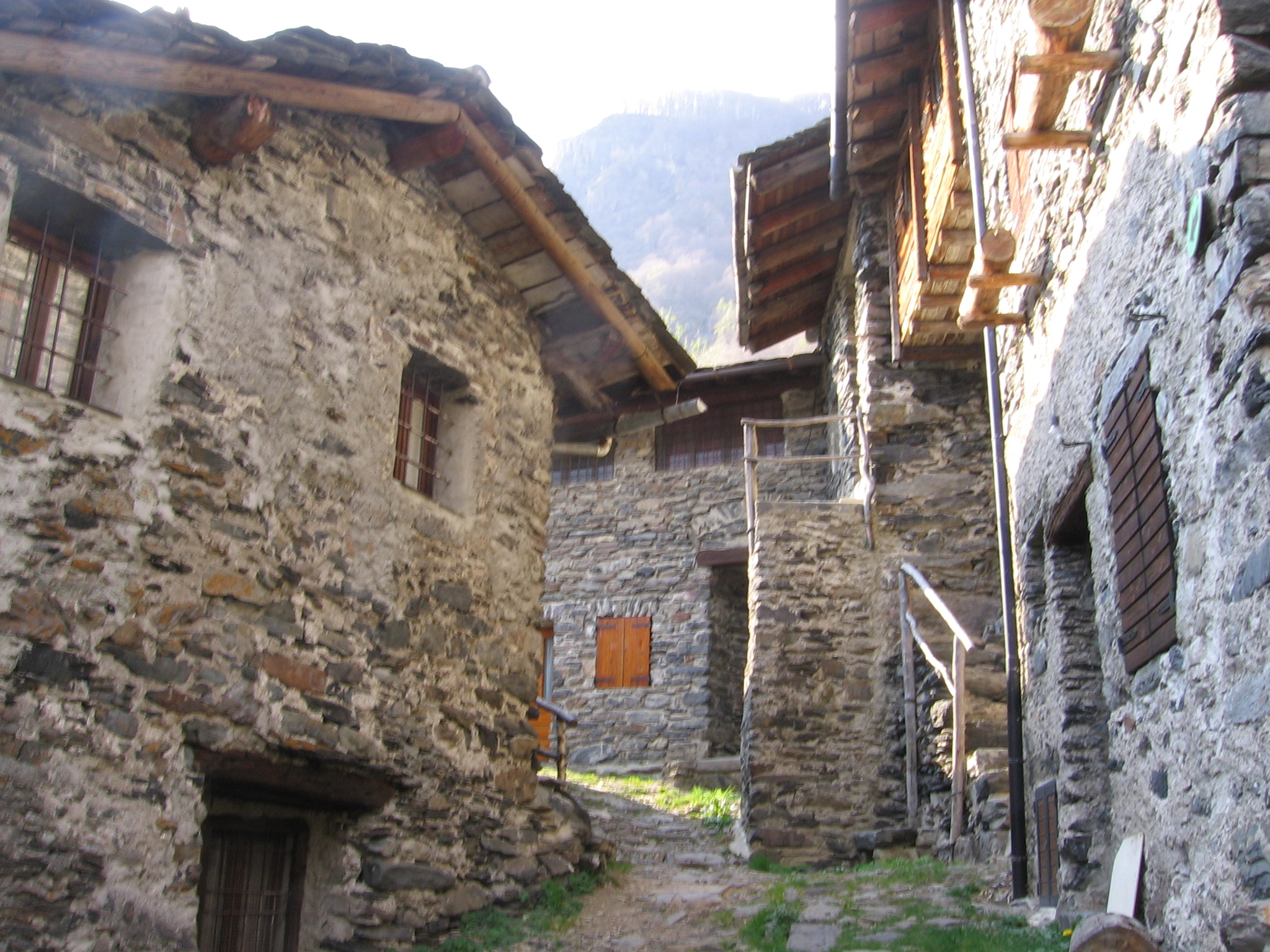 Loc. Maslana, Valbondione, Bergamo, Italia